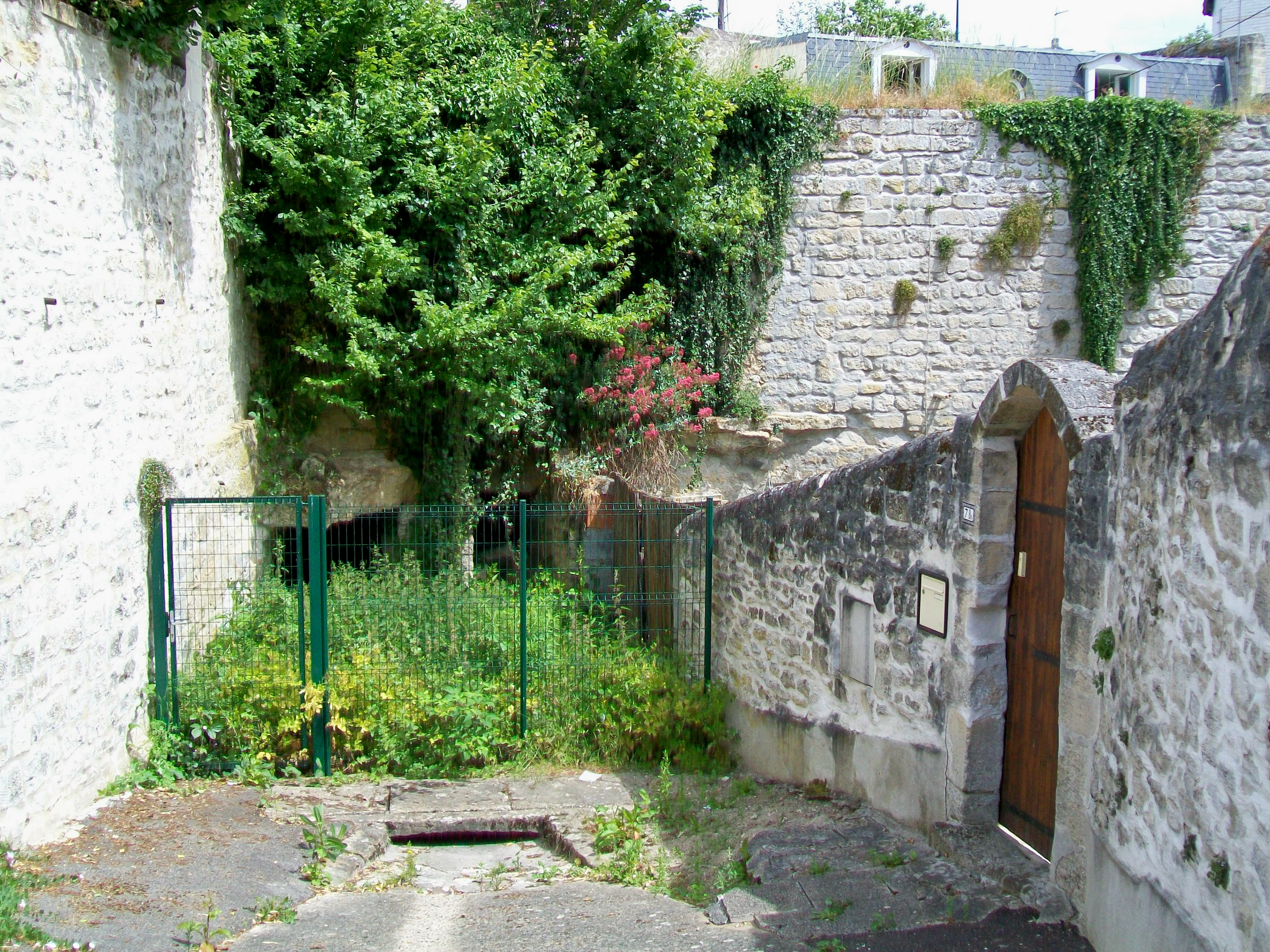 Lieu-dit les carrières de Vineuil, rue Charles : ancienne habitation troglodytique au bout d'une impasse. On en trouve aussi rue du Plan. La maison à deux étages dont on aperçoit le toit au fond est construite au fond d'une carrière : le sommet du toit dépasse à peine le niveau de la rue.